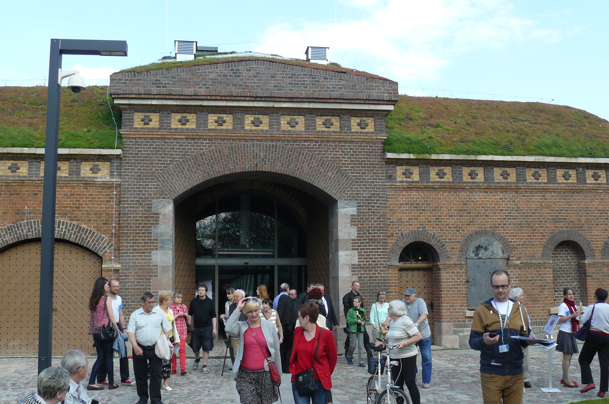 Otwarcie ICHOT w Poznaniu. 1.5.2014r.